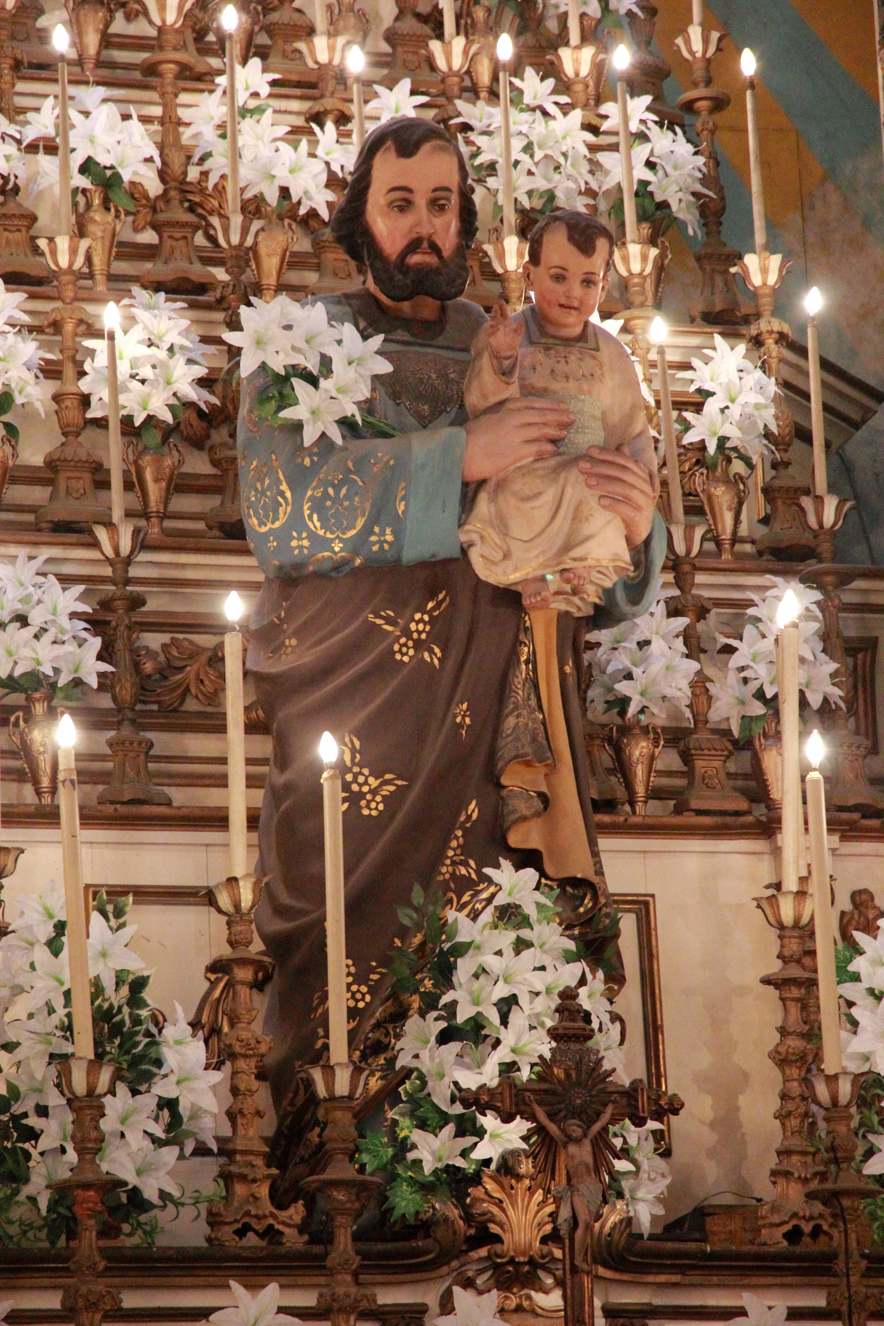 Igreja de São José no Centro da Cidade do Rio de Janeiro. Imagem de São José no altar.